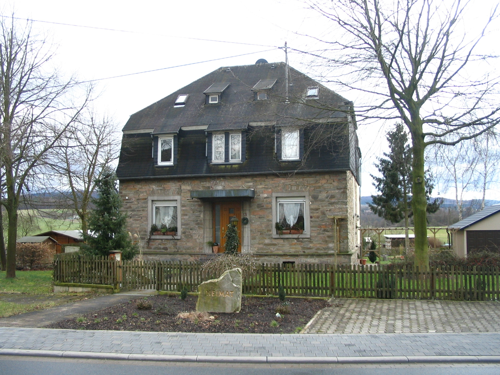 Heimatstein in Woppenroth